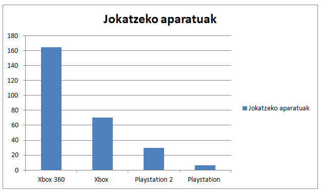 jokatzeko aparatuen grafikoa